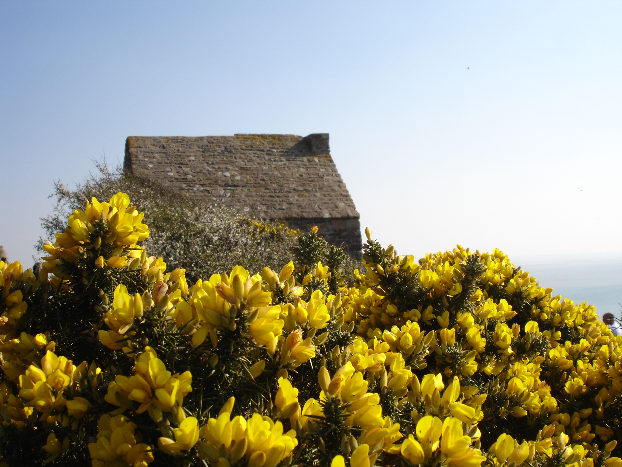 France, Manche (50), Cabane Vauban